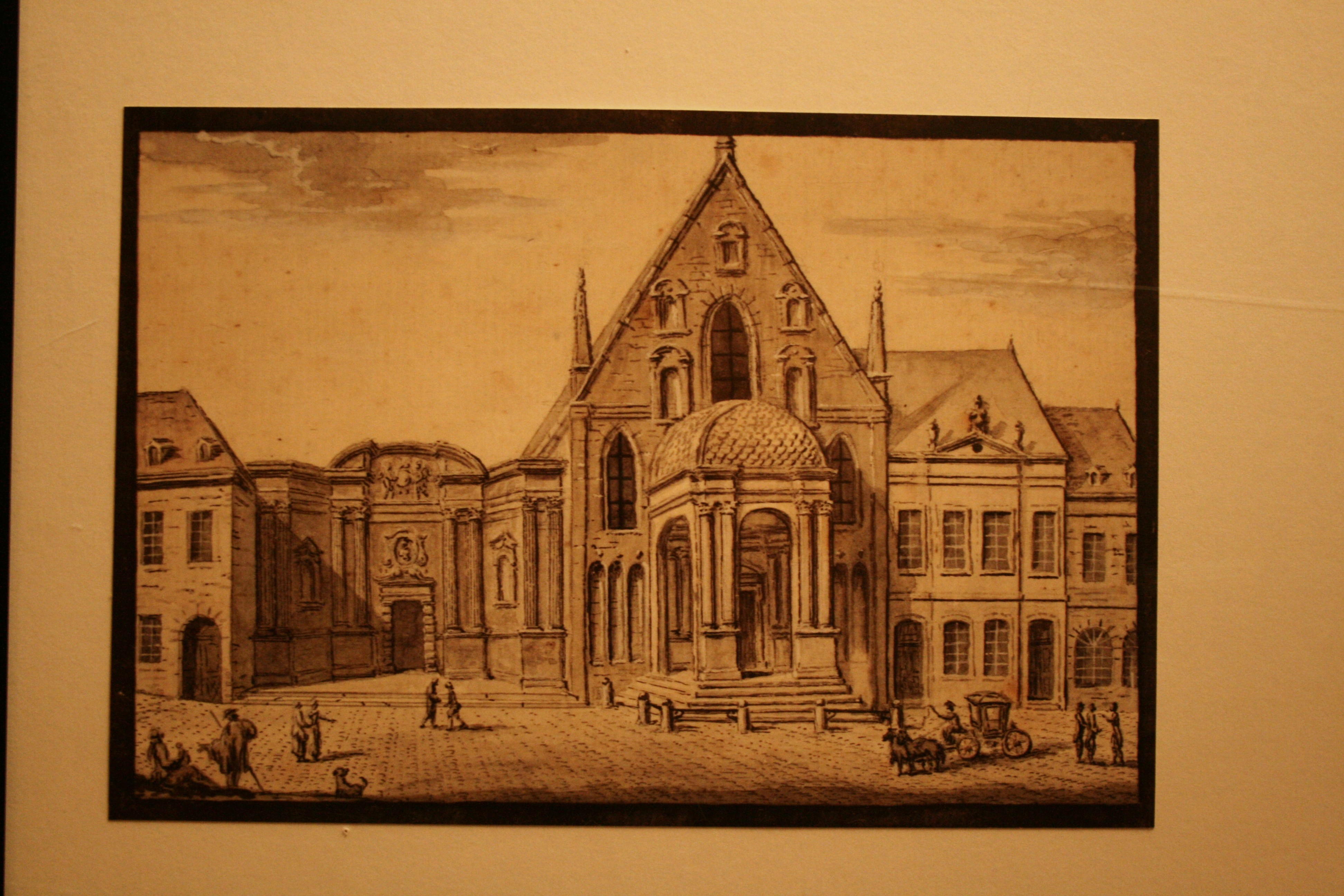 Vue du Palais et de la Chambre des Comptes de Dijon vers 1800 Aquarelle Pierre Joseph Antoine